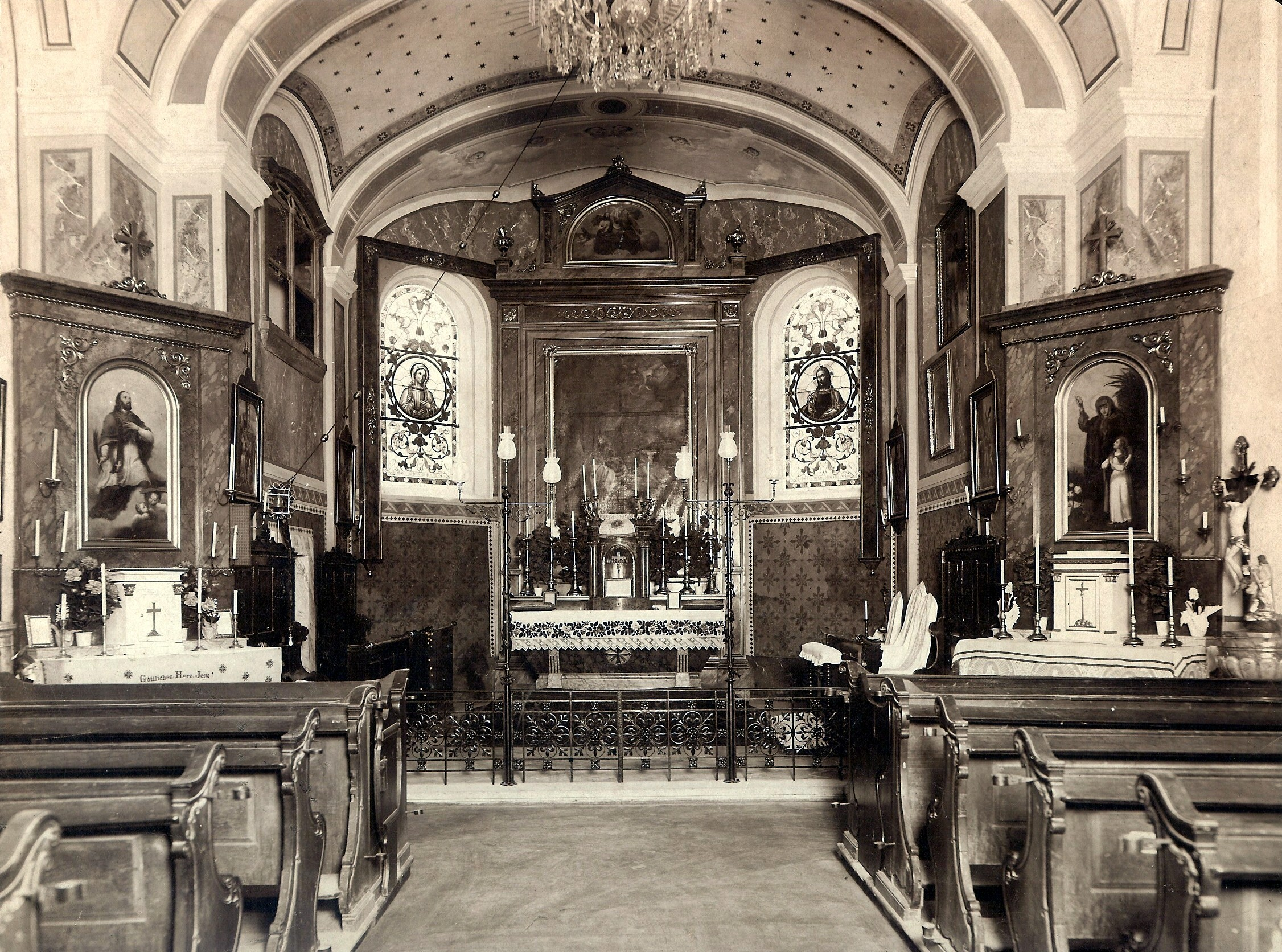 Innenraum der ehemaligen Servatiuskirche in Wien Liesing